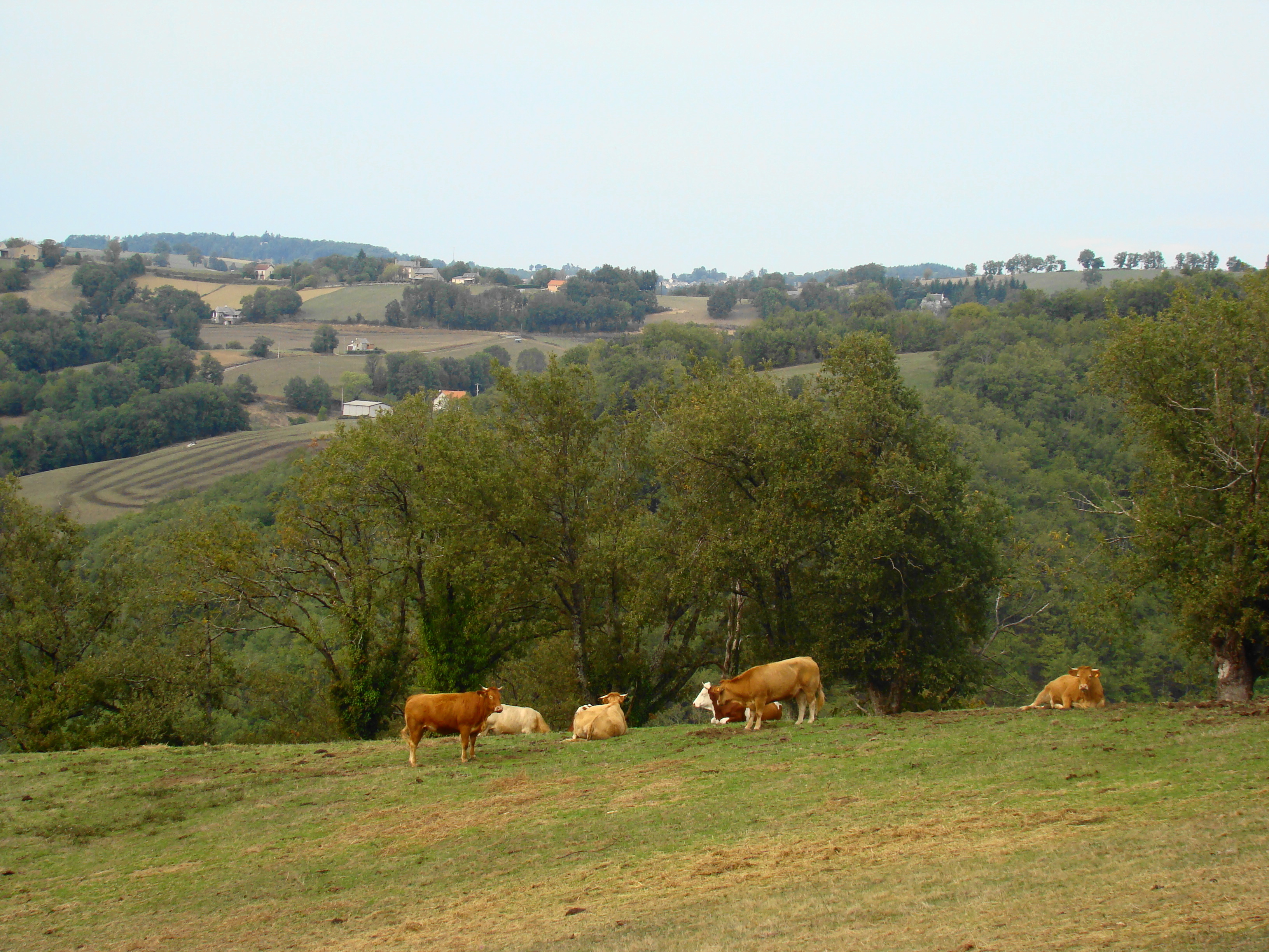 Troupeau au lieu-dit "La Baute"